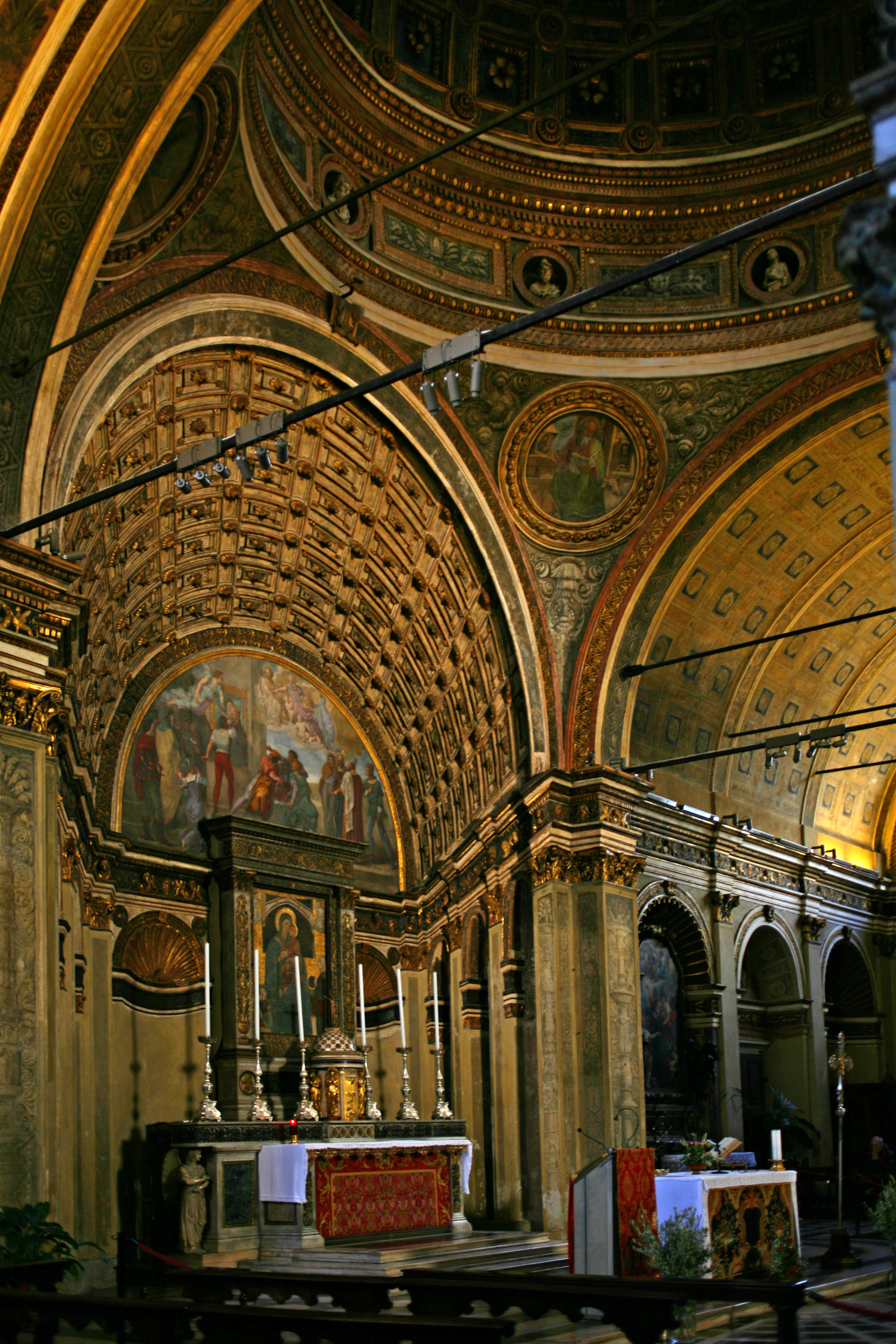 La chiesa di San Satiro a Milano nelle sue viste esterne e interne